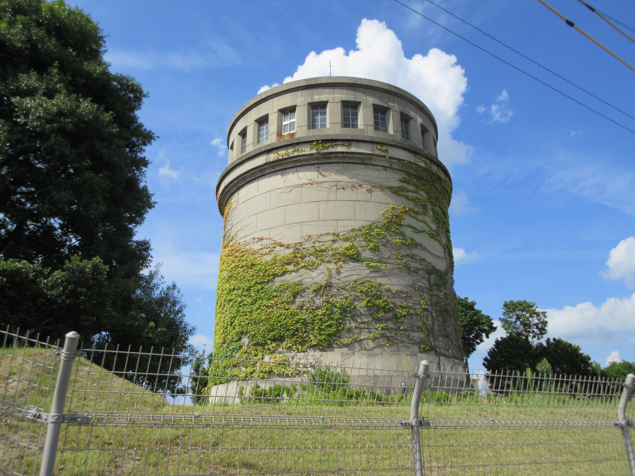 六供配水場（岡崎市六供町）